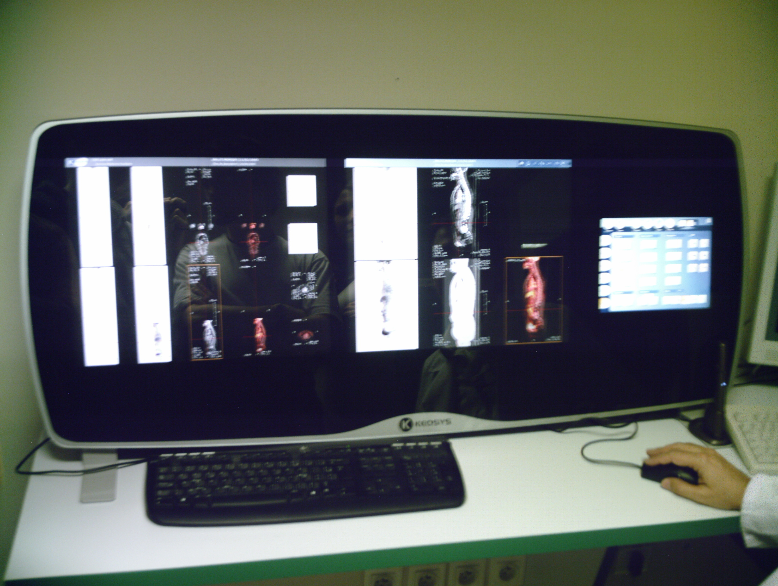 Écran large d'ordinateur en médecine nucléaire, relié à un système PACS, pour la visualisation des images tomographiques de patient. L'écran large permet d'afficher plusieurs image cote à cote. Il est composé de trois sous-écrans, dont deux pour la visualisation des images, et un pour le choix du dossier.